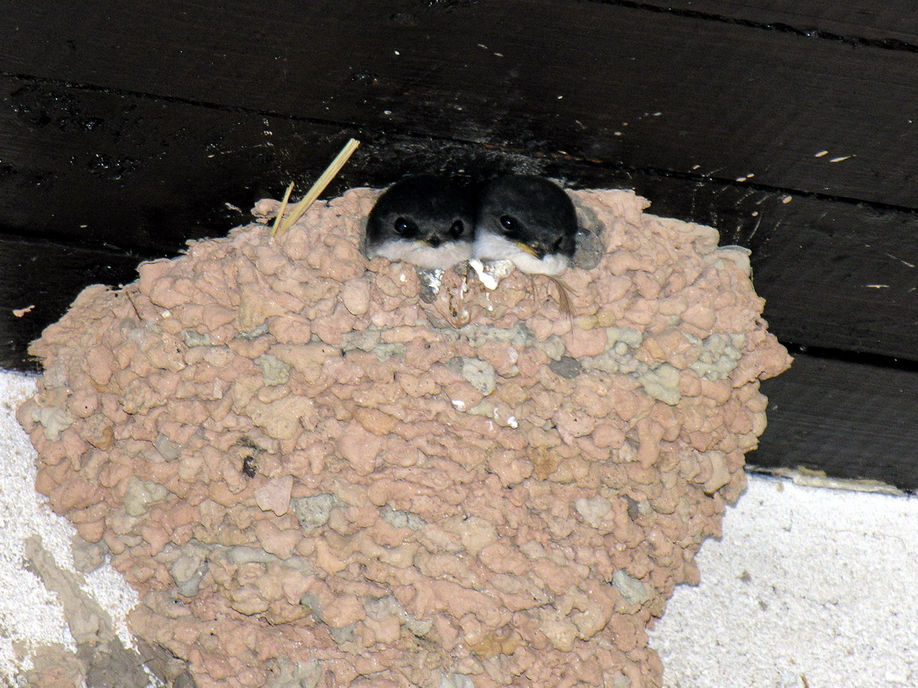 Langinė kregždė (Delichon urbica), 2 juv. Šeima. Kregždiniai (Hirundinidae) Foto: Algirdas, 2006 m. rugpjūčio 10 d., Lietuva